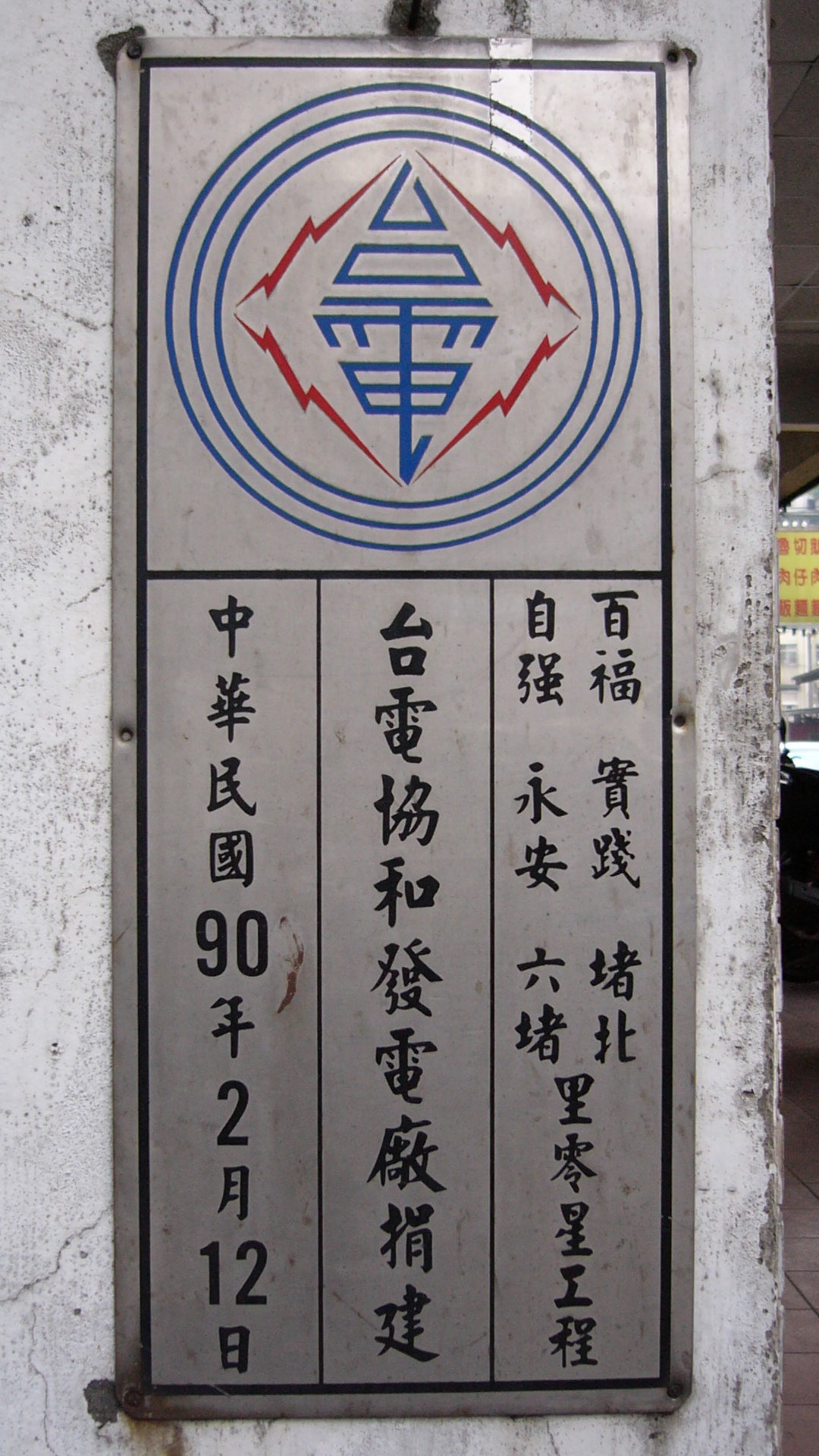 台灣電力公司協和發電廠捐建基隆市七堵區六里（百福里、實踐里、堵北里、自強里、永安里、六堵里）零星工程紀念牌，2001年2月12日釘掛於七堵區百六街公寓外牆。